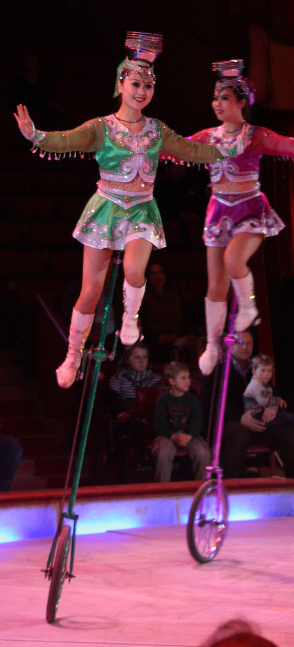 Einradartisten im Zirkus. Hohhottruppe aus der inneren Mongolei. Das sind 5 Damen die sich auf dem Einrad Geschirr zuwerfen, das sie auf dem Kopf auffangen.